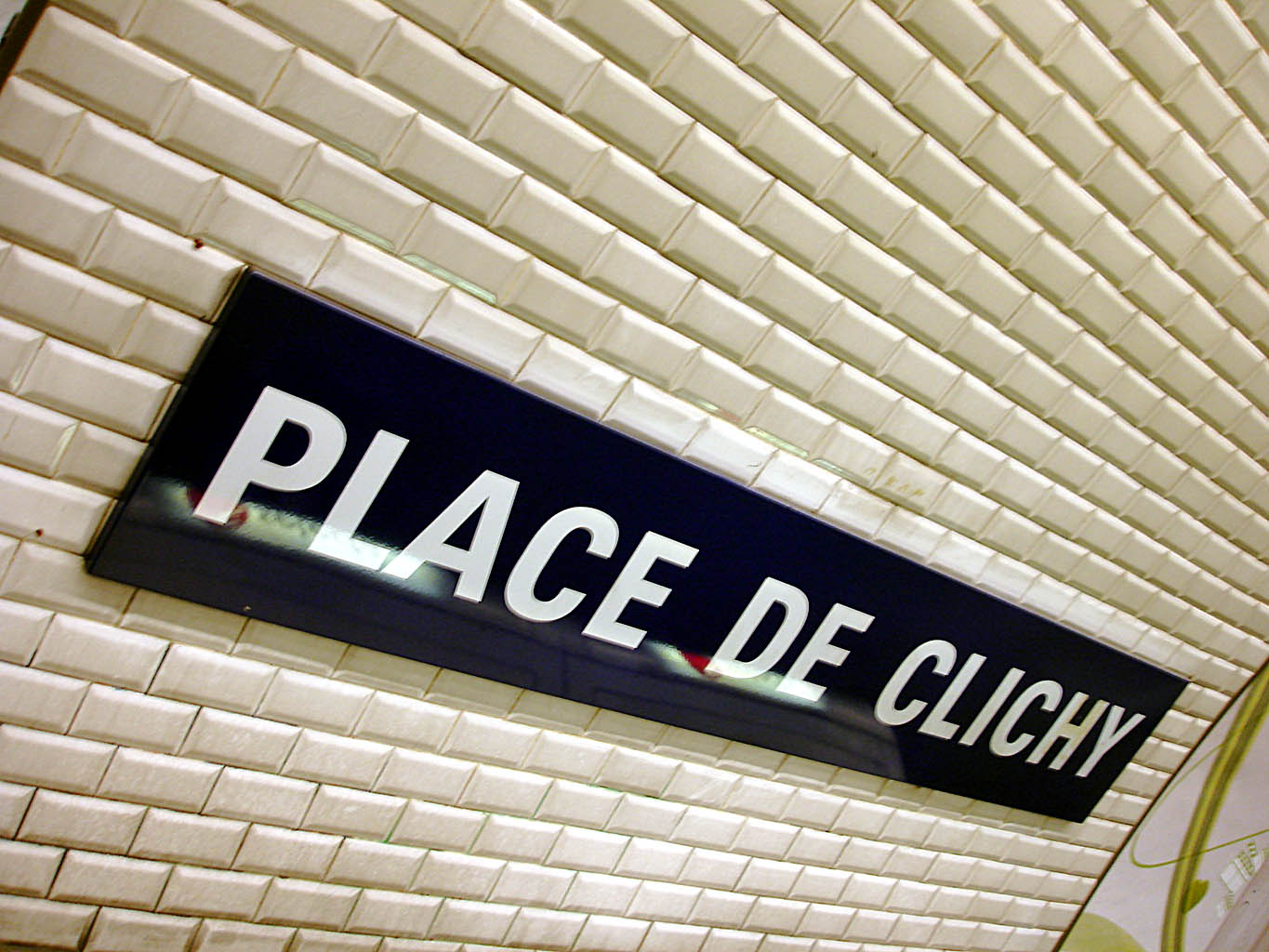 Station Place de Clichy de la ligne 2 du métro de Paris, France.